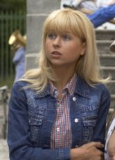 Актриса Мирослава Карпович на съёмках фильма «Святое дело», 2007 год.